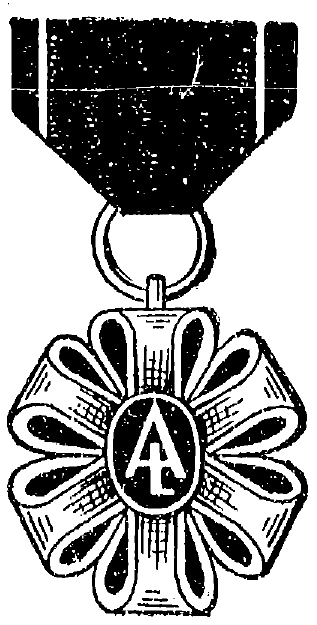 Wzór odznaczenia „Wawrzyn Akademicki” zgodnie z zarządzeniem Ministra Wyznań Religijnych i Oświecenia Publicznego z dnia 21 lutego 1934 r. (M.P. 1934 nr 74 poz. 113)